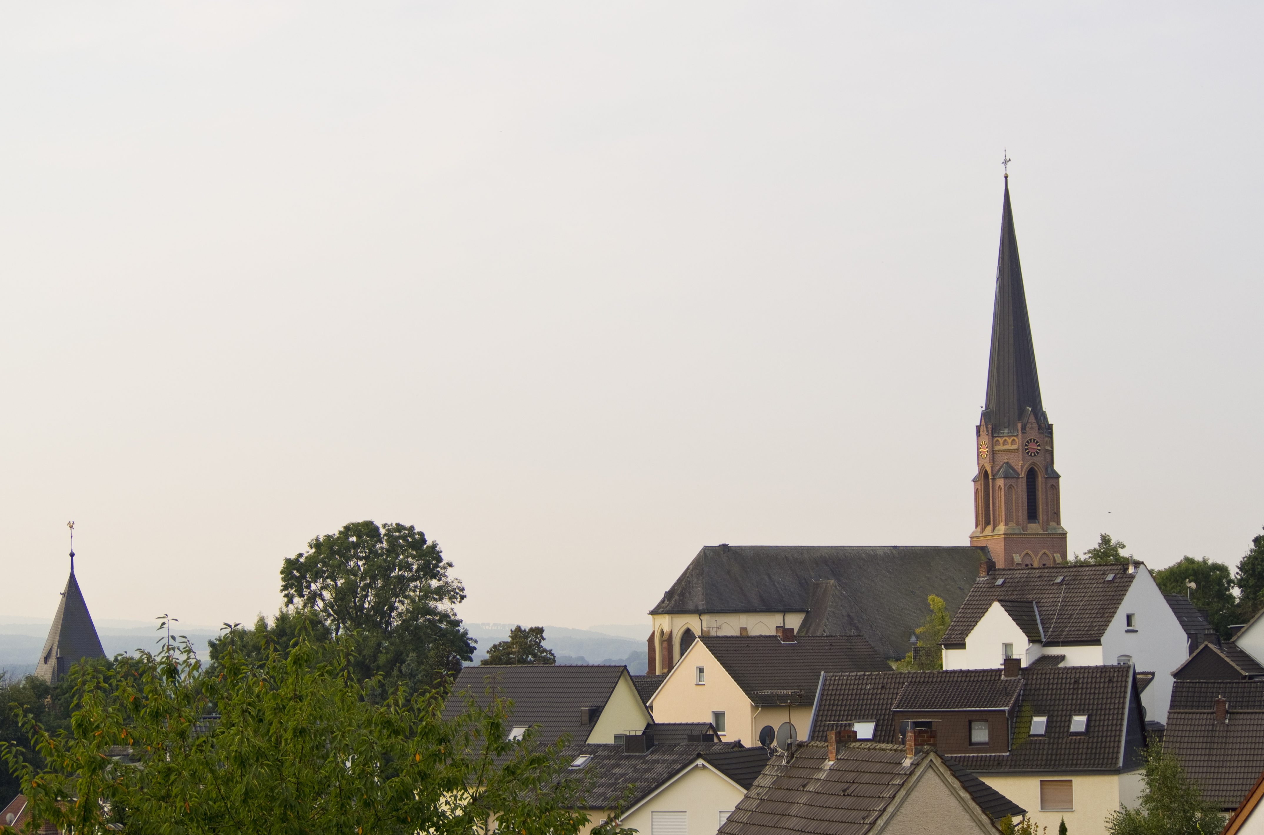 Katholische Pfarrkirche St. Marien in Fröndenberg, Auf dem Sodenkamp This is a photograph of an architectural monument.